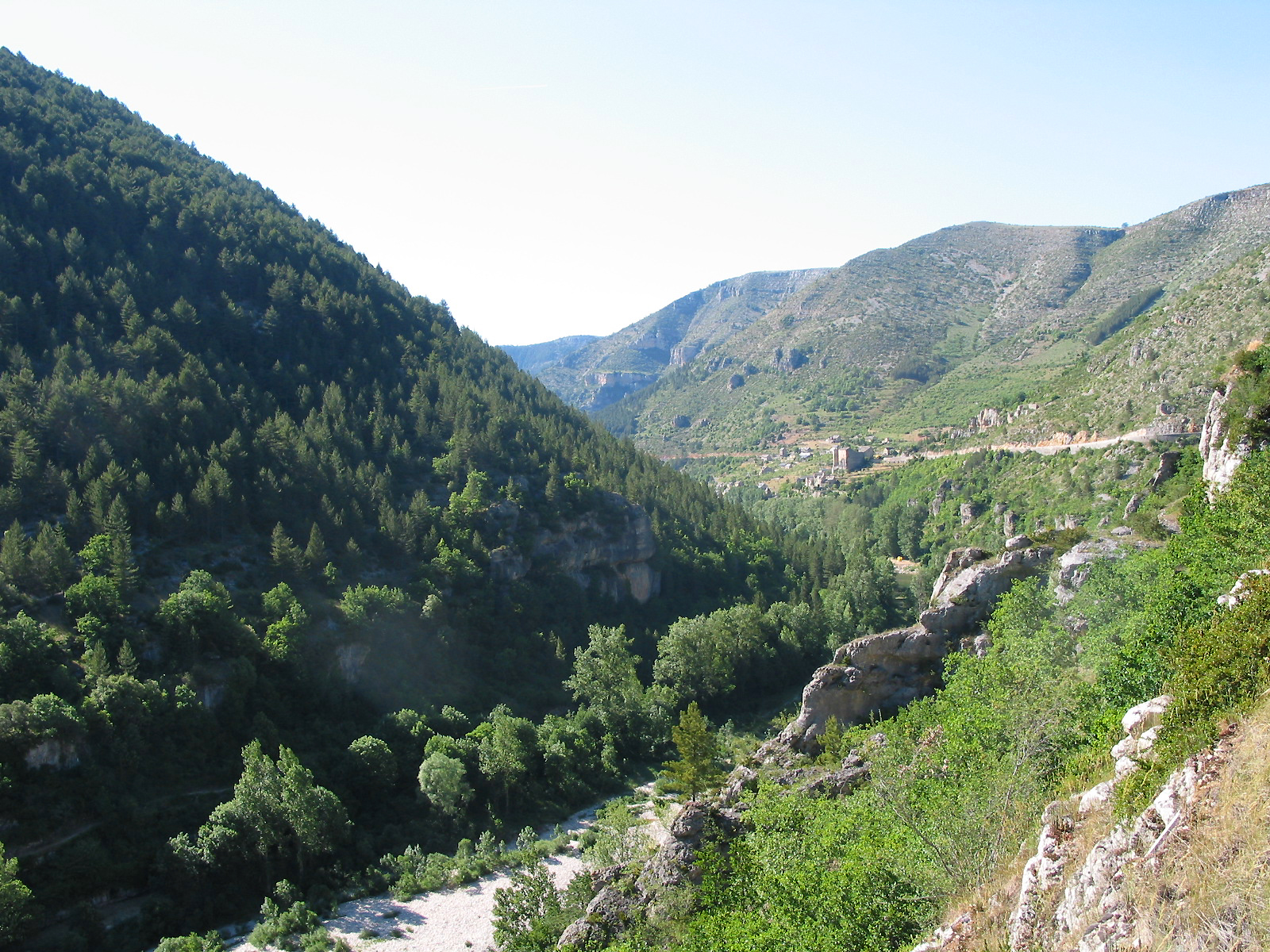 Prades (Tarn), le village dans les Gorges du Tarn.